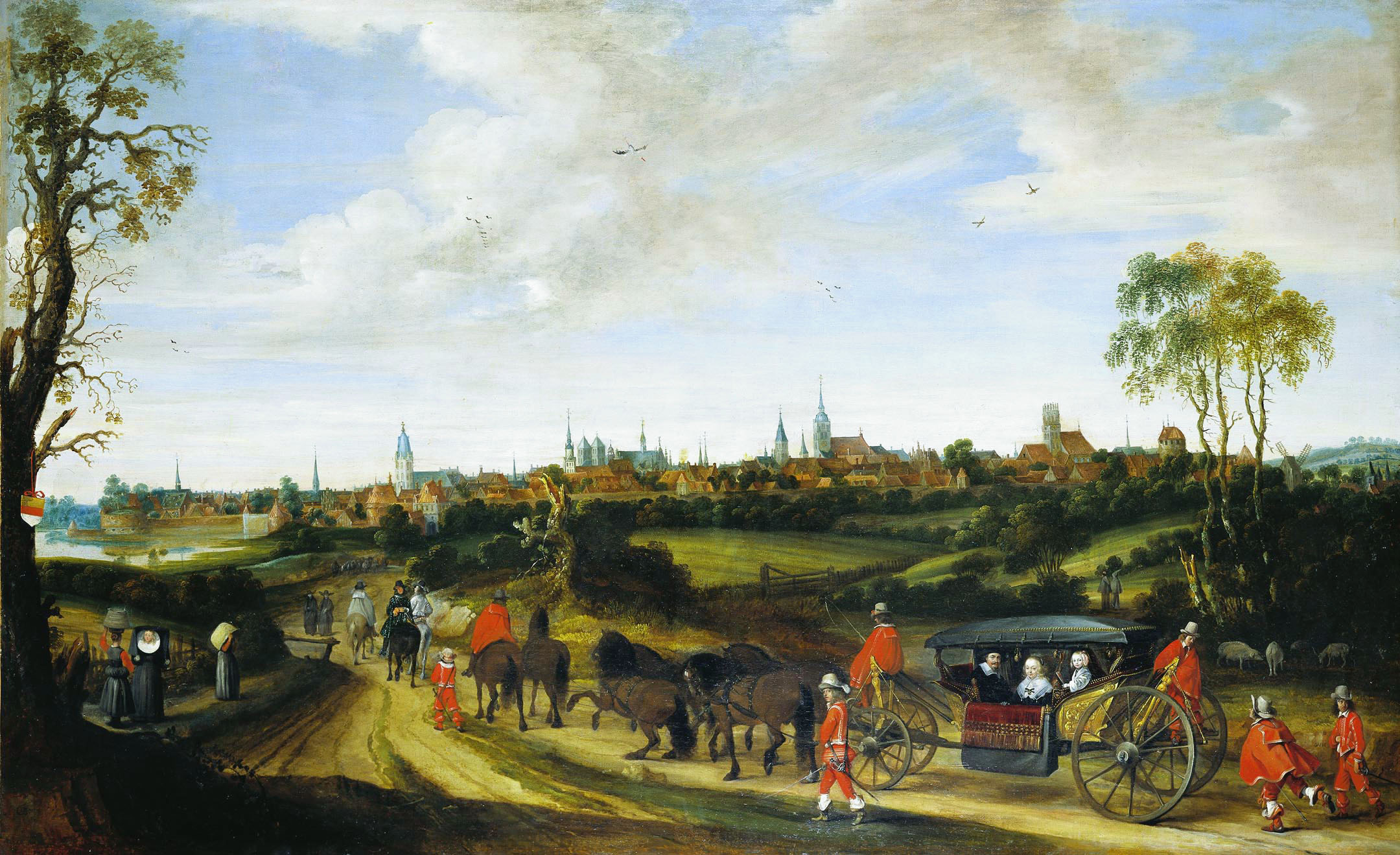 Intocht van de gezant Adriaan Pauw in Münster.label QS:Lnl,"Intocht van de gezant Adriaan Pauw in Münster."label QS:Lde,"Einzug des Gesandten Adriaen Pauw in Münster"